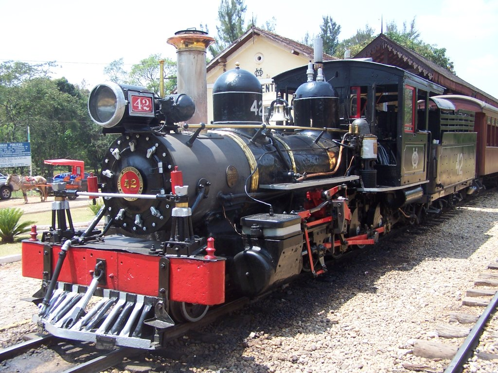 Locomotiva na Estação, Tiradentes - MG, Brasil.